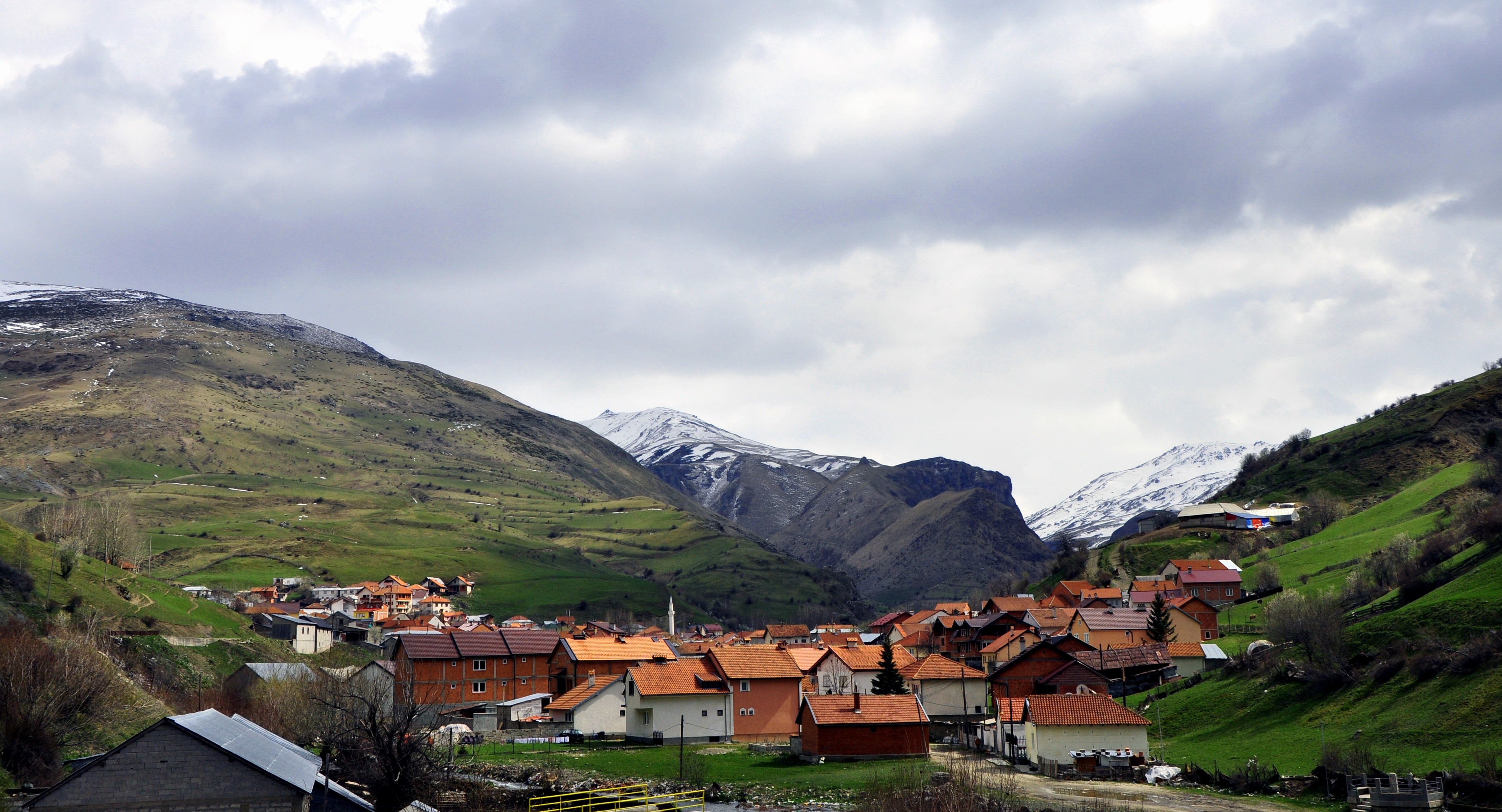 selo Bord, Dragaš